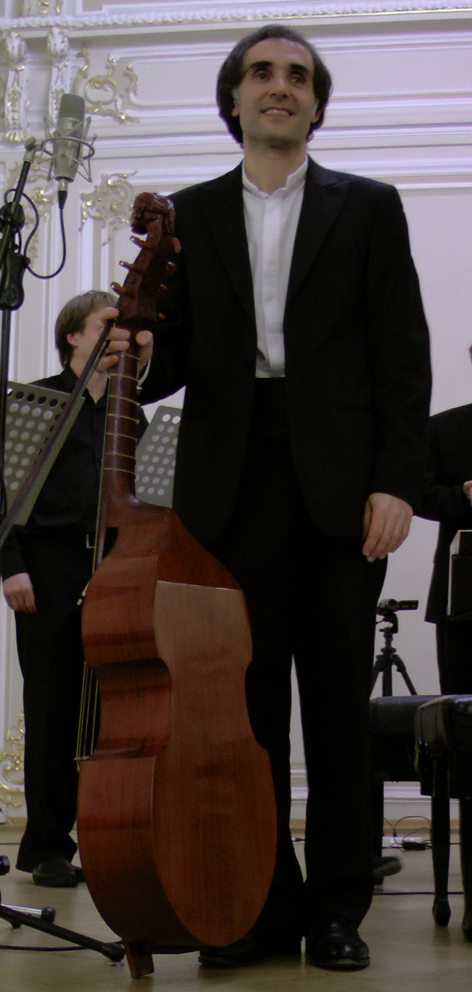 Витторио Гиельми на X международном фестивале "Музыкальная коллекция" в Санкт-Петербурге 13.05.2015